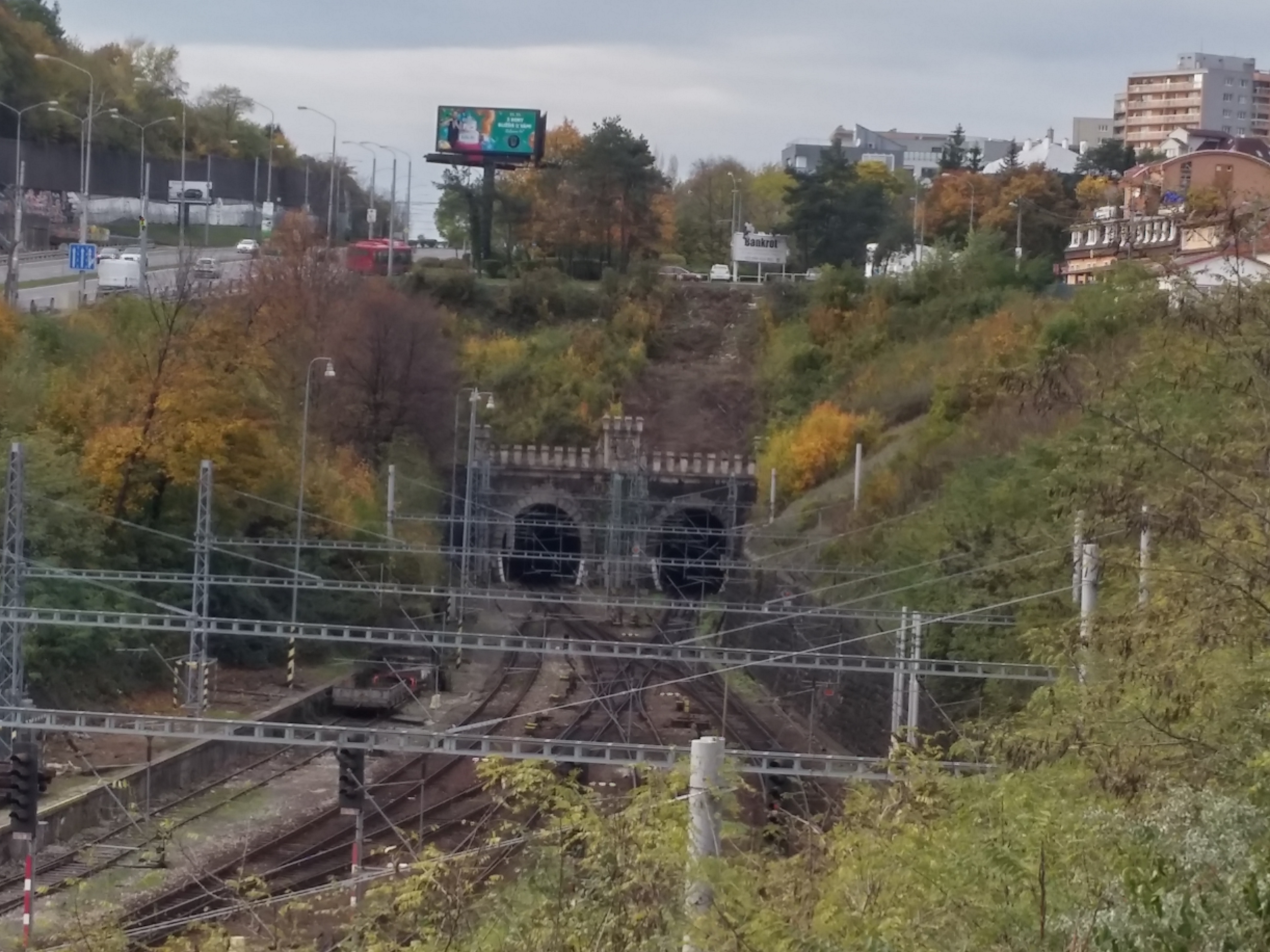 Lamačský tunel, Bratislava